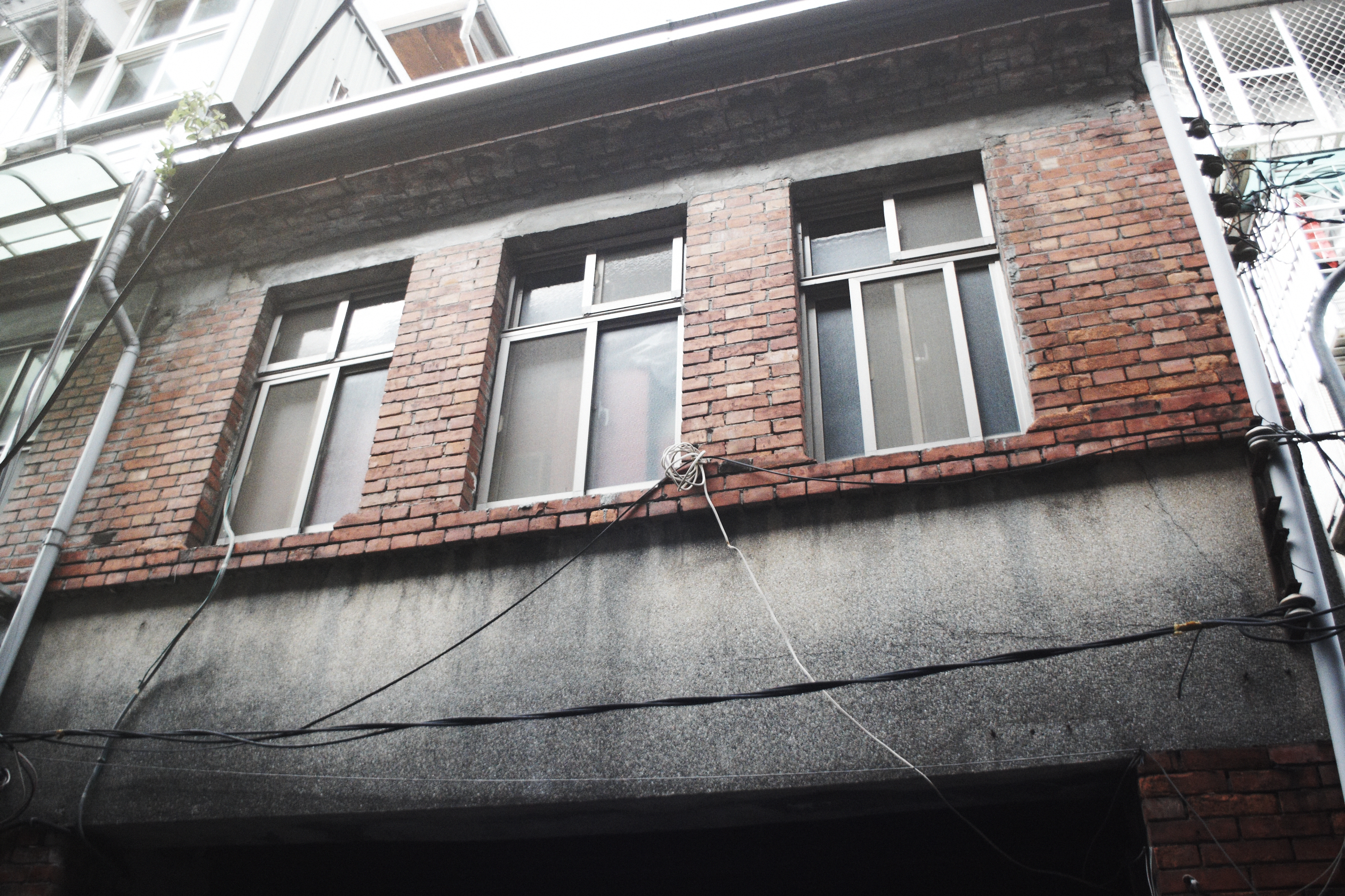 中文（台灣）: 莊頭北工業發跡處：台北市大同區伊寧街89號。